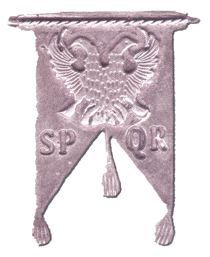 Emblema de la Hermandad de Armados de Ntro. Padre Jesús Nazareno de Ocaña (Toledo)